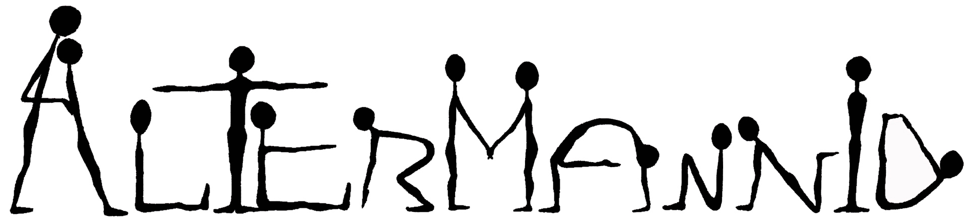 Logo autor Kadri Toomsalu